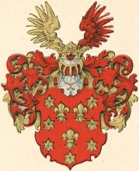 Lieveni suguvõsa parunivapp